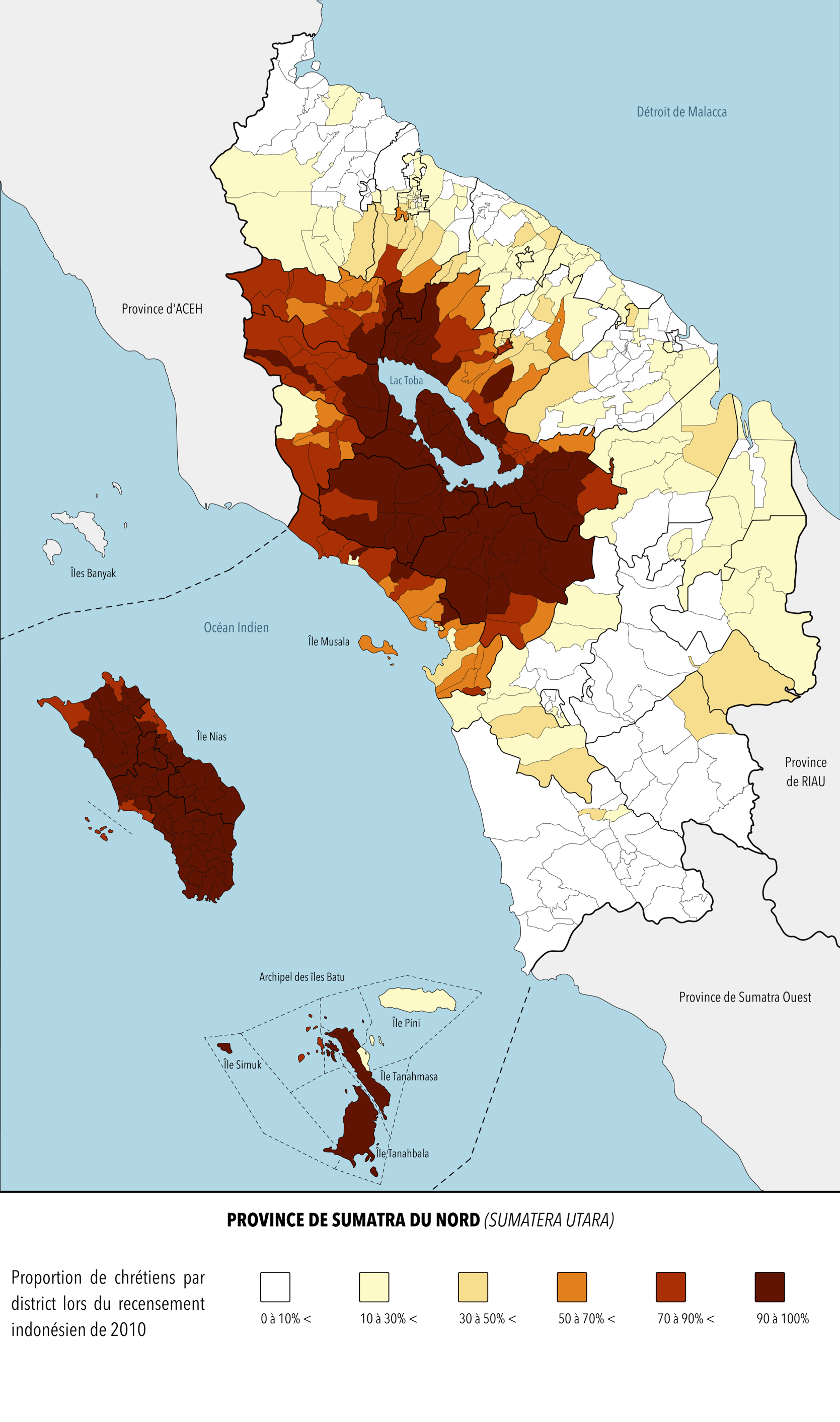 Répartition du christianisme